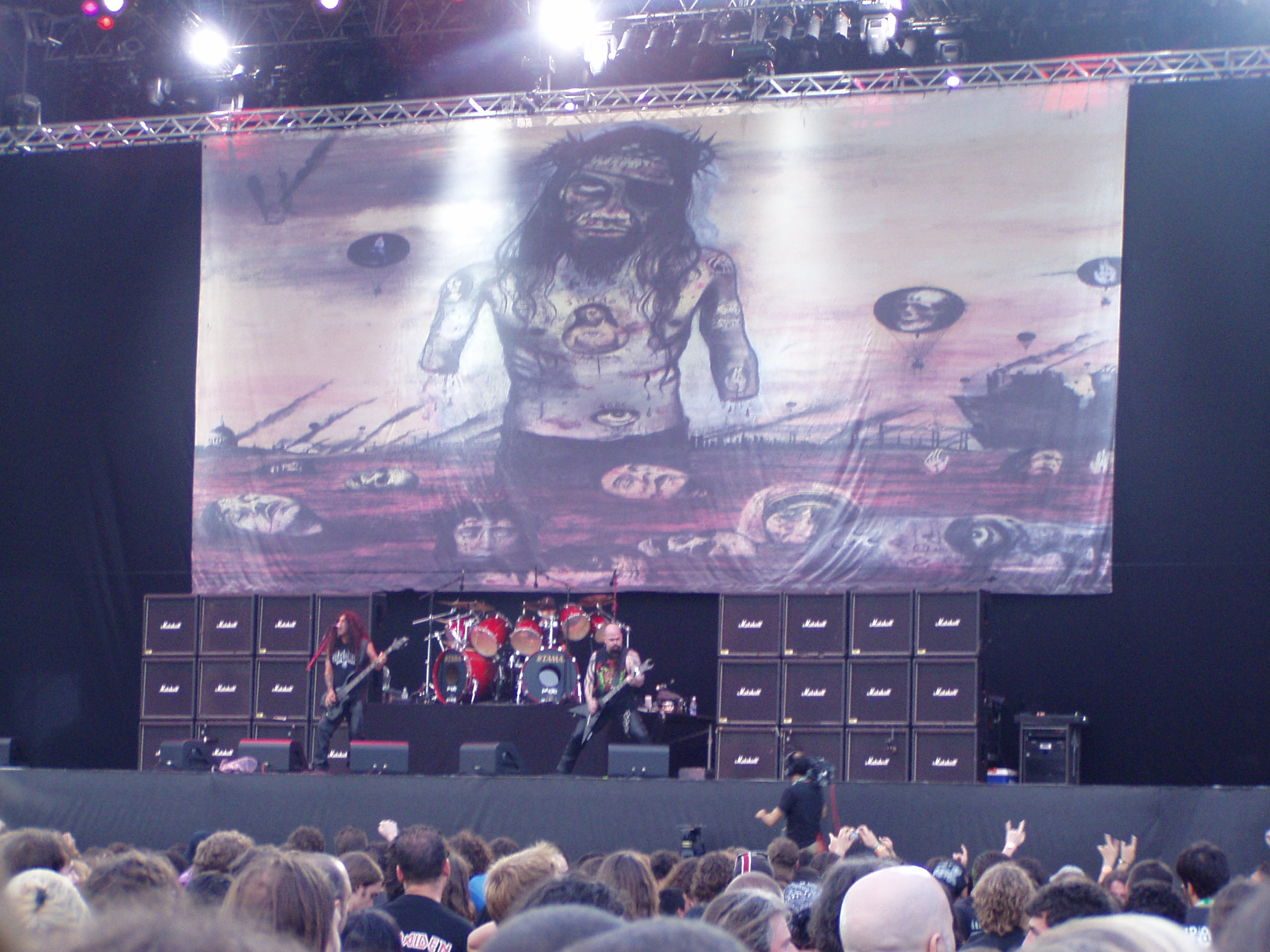 Gli Slayer all'Heineken Jammin' Festival 2007